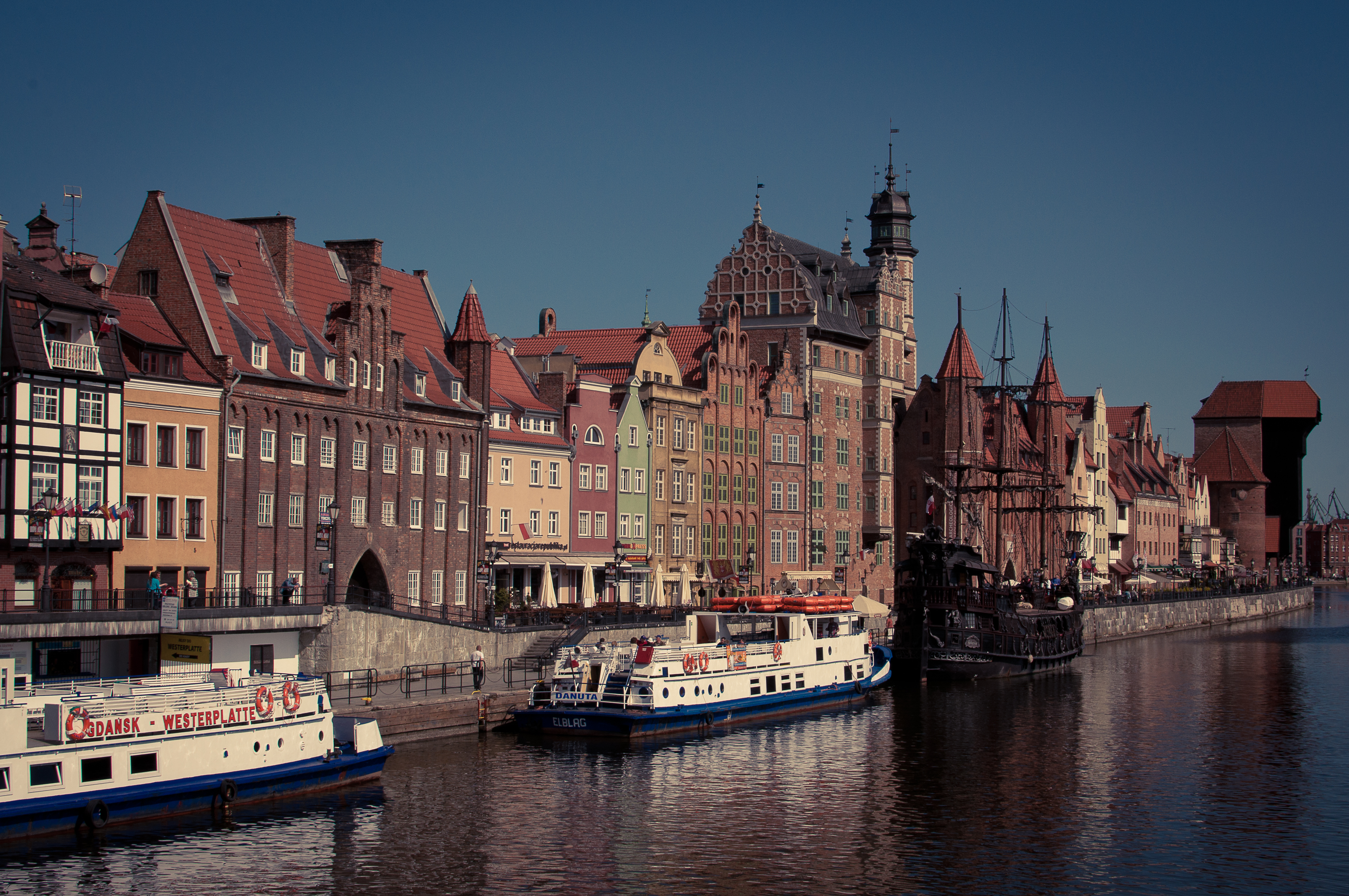 Gdańsk Główne Miasto - zabudowa Długiego Pobrzeża nad Motławą